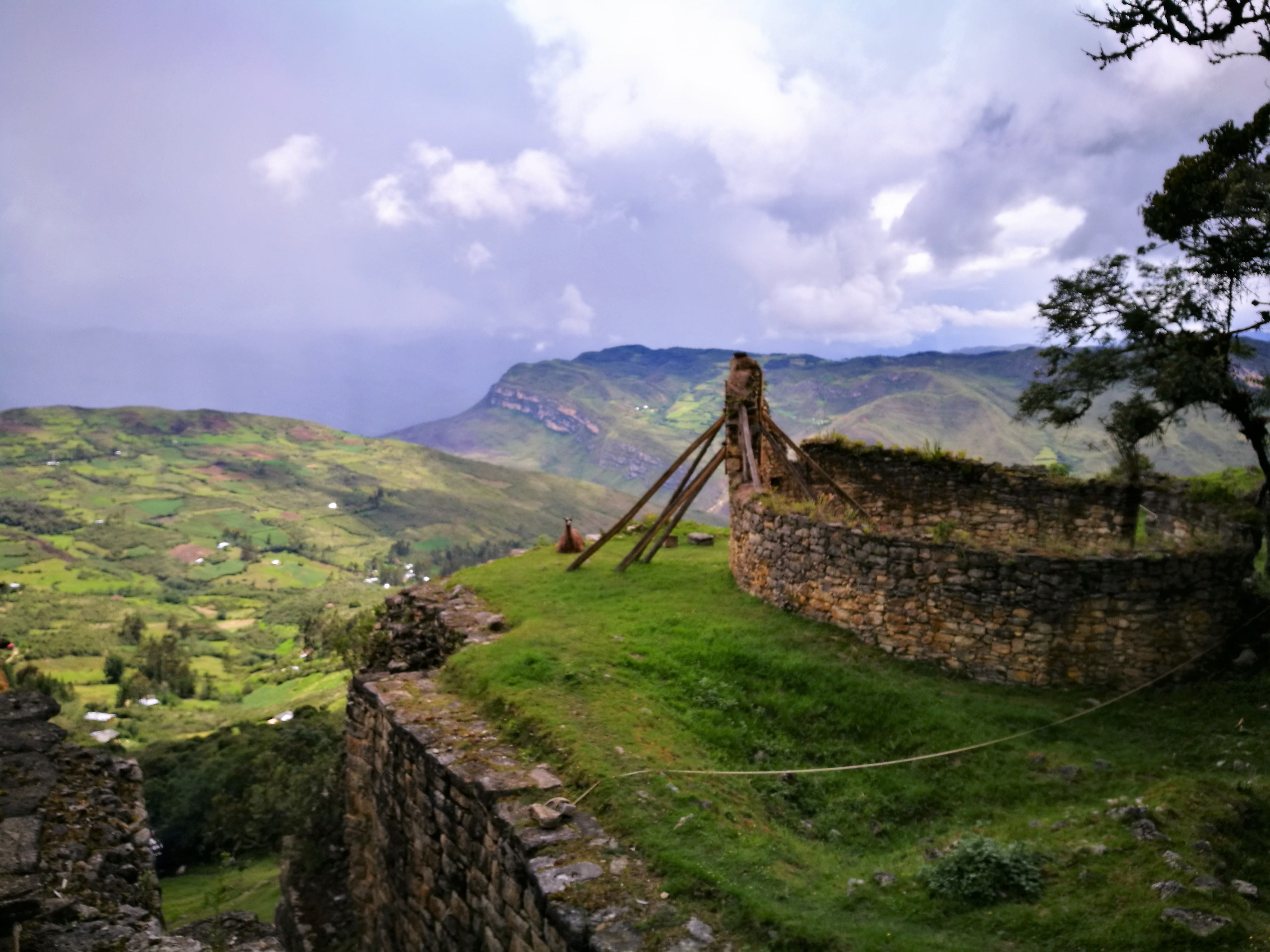 Ruïnes de Kuelap amb el paisatge